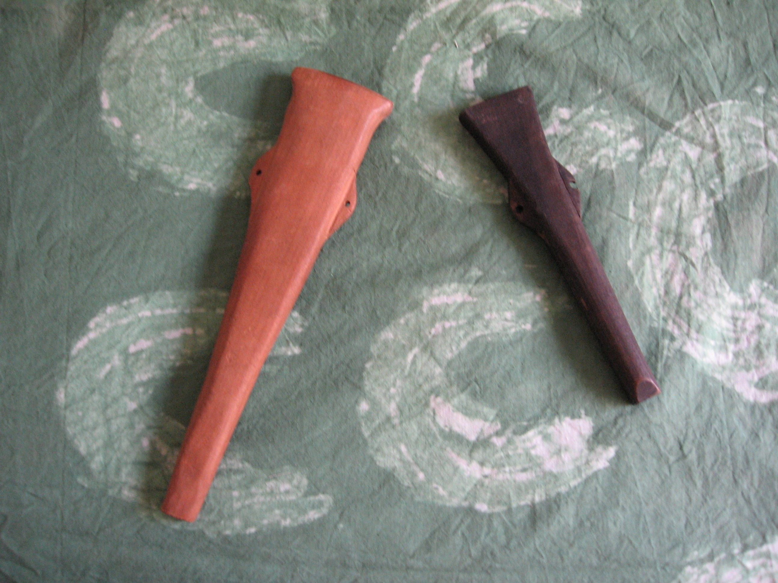 Flauta sin orificios de la Patagonia, que se utiliza para hacer rítmicas.